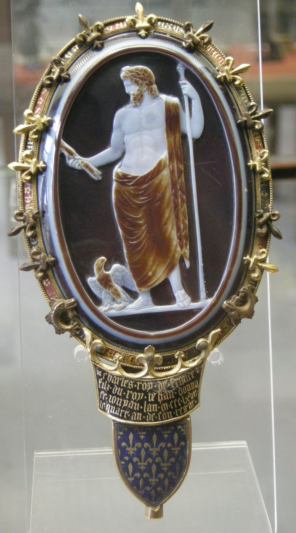 Camée de Chartres, Jupiter et l'aigle - Donné en 1367 par Charles V à la cathédrale de Chartres (inscription gothique). Monture circulaire possiblement du milieu du XIIe siècle (verset de saint Jean en lettres carolines In Principio Erat Verbum...) - ancien trésor royal de Charles V